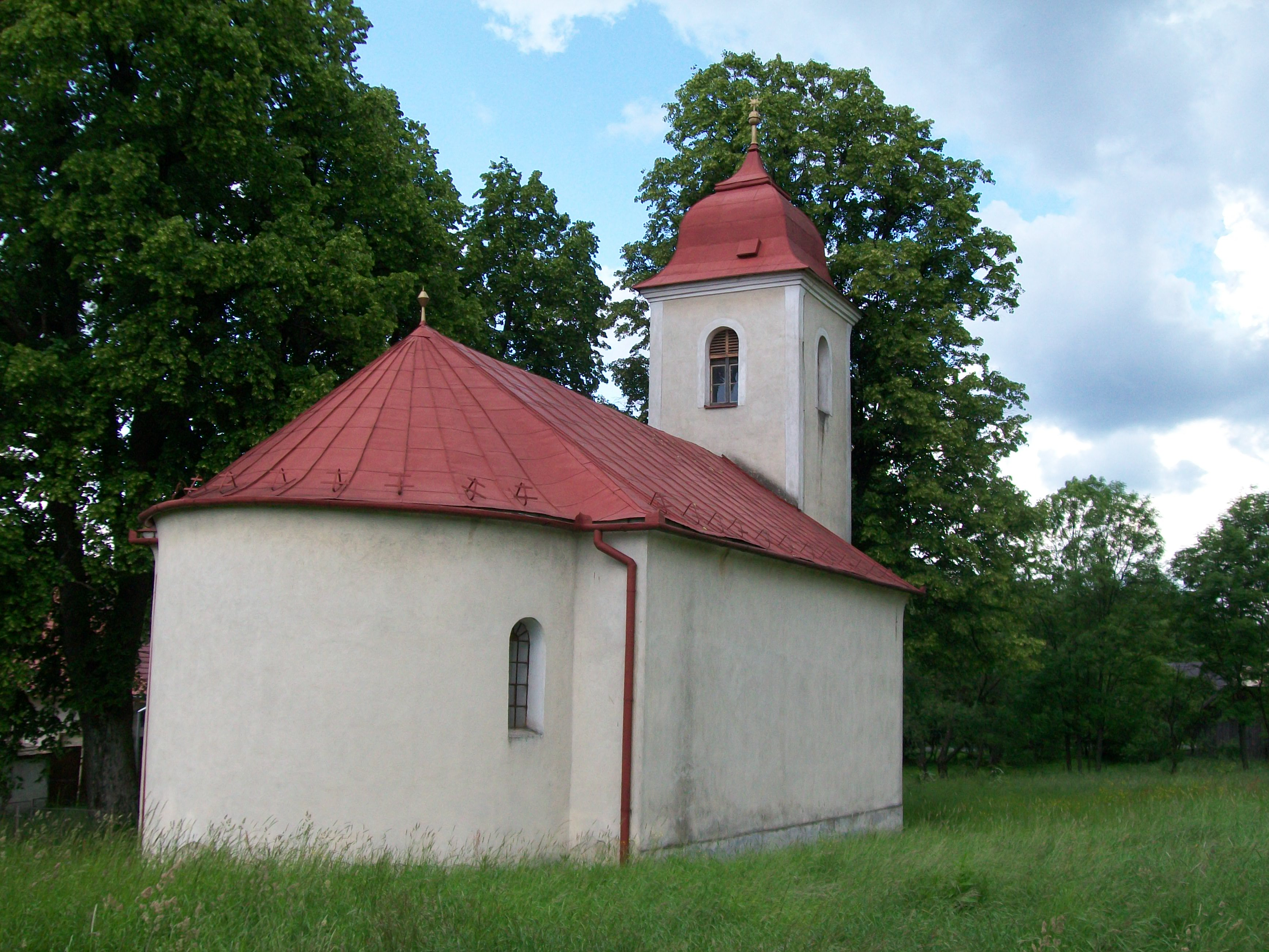 Evanjelický kostol v obci Polichno, bol postavený v roku 1788 za pôsobenia Adama Petiana.